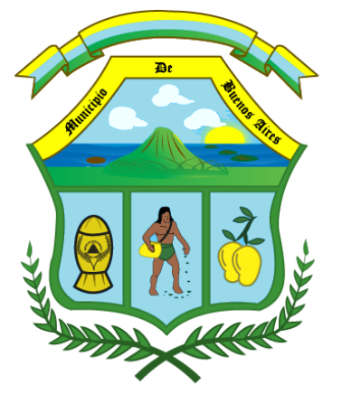 Escudo de Buenos Aires.